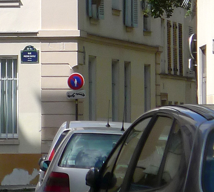 Maison d'angle des rues Pierre-Bayle et du Repos (bornage de 1724) - Paris XX